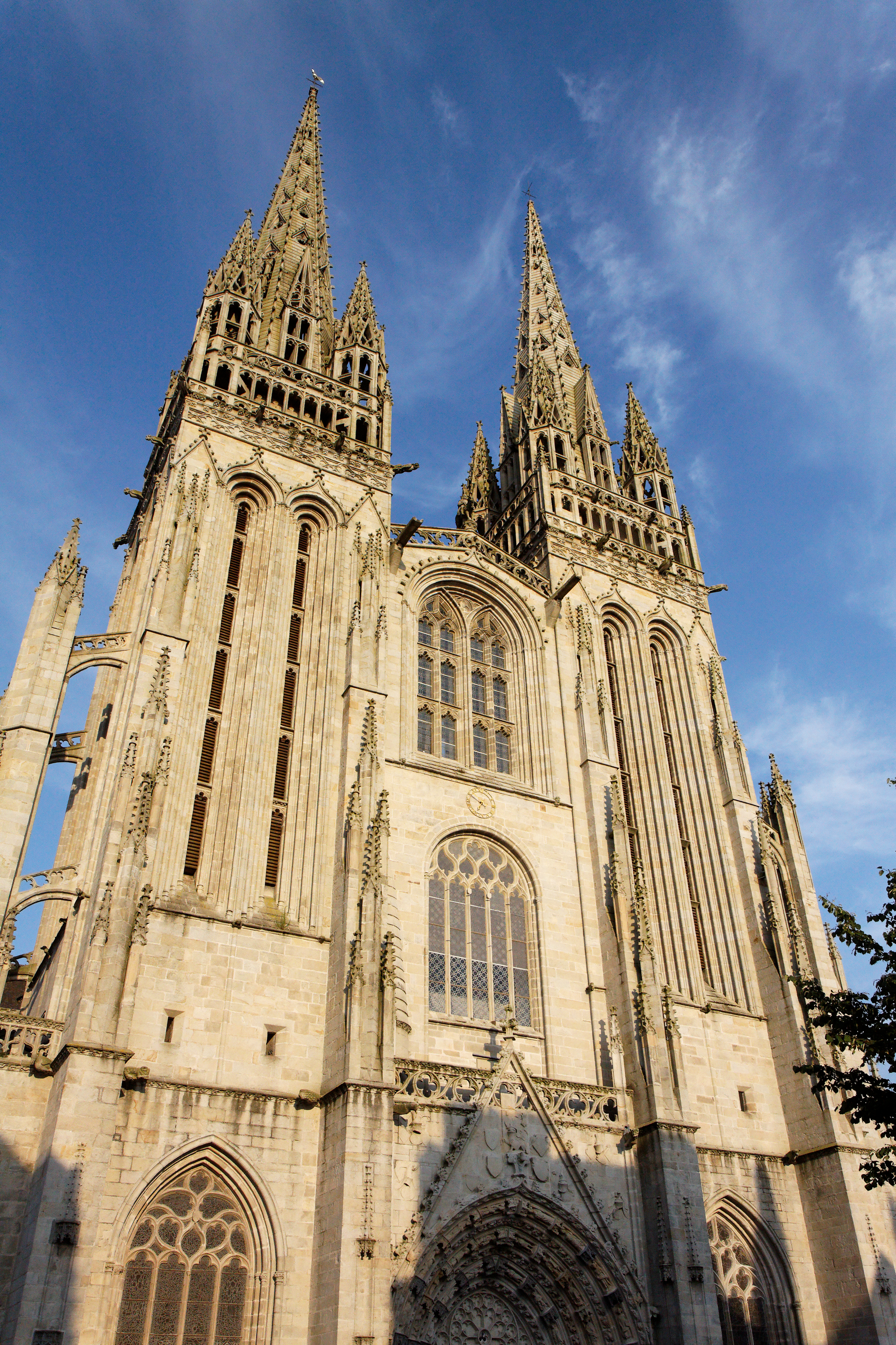 Vue des flèches de la cathédrale de Quimper. .